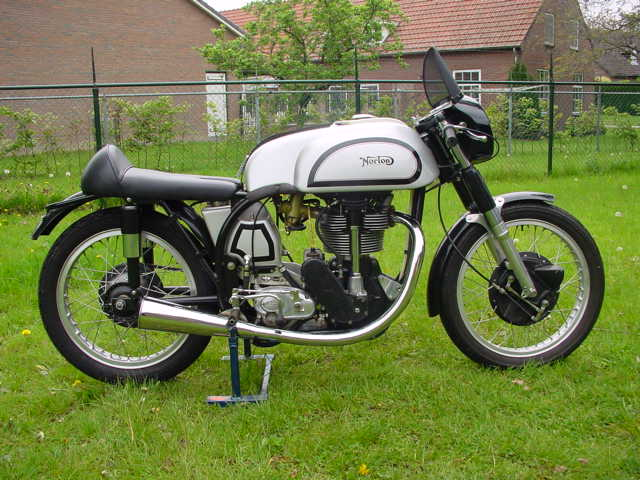 Toestemming van Yesterdays Antique Motorcycles